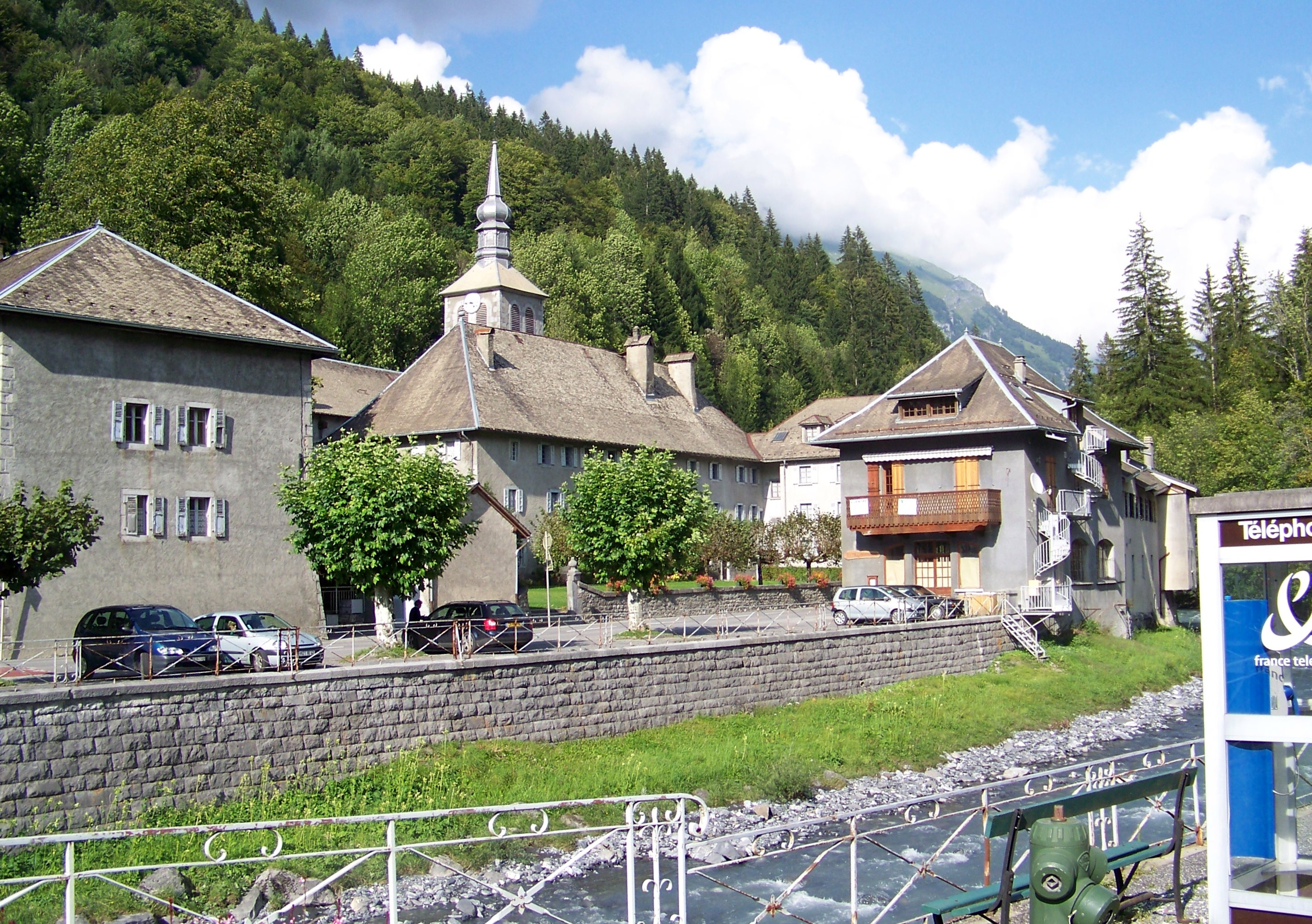 le village au bord du Giffre avec l'abbaye de Sixt